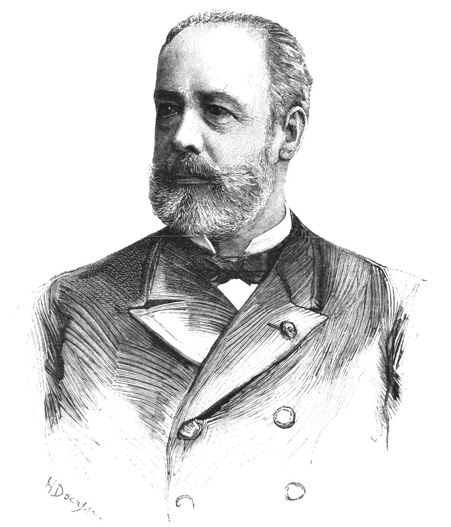 "M. le docteur Léon Labbé, récemment élus sénateur de l'Orne".